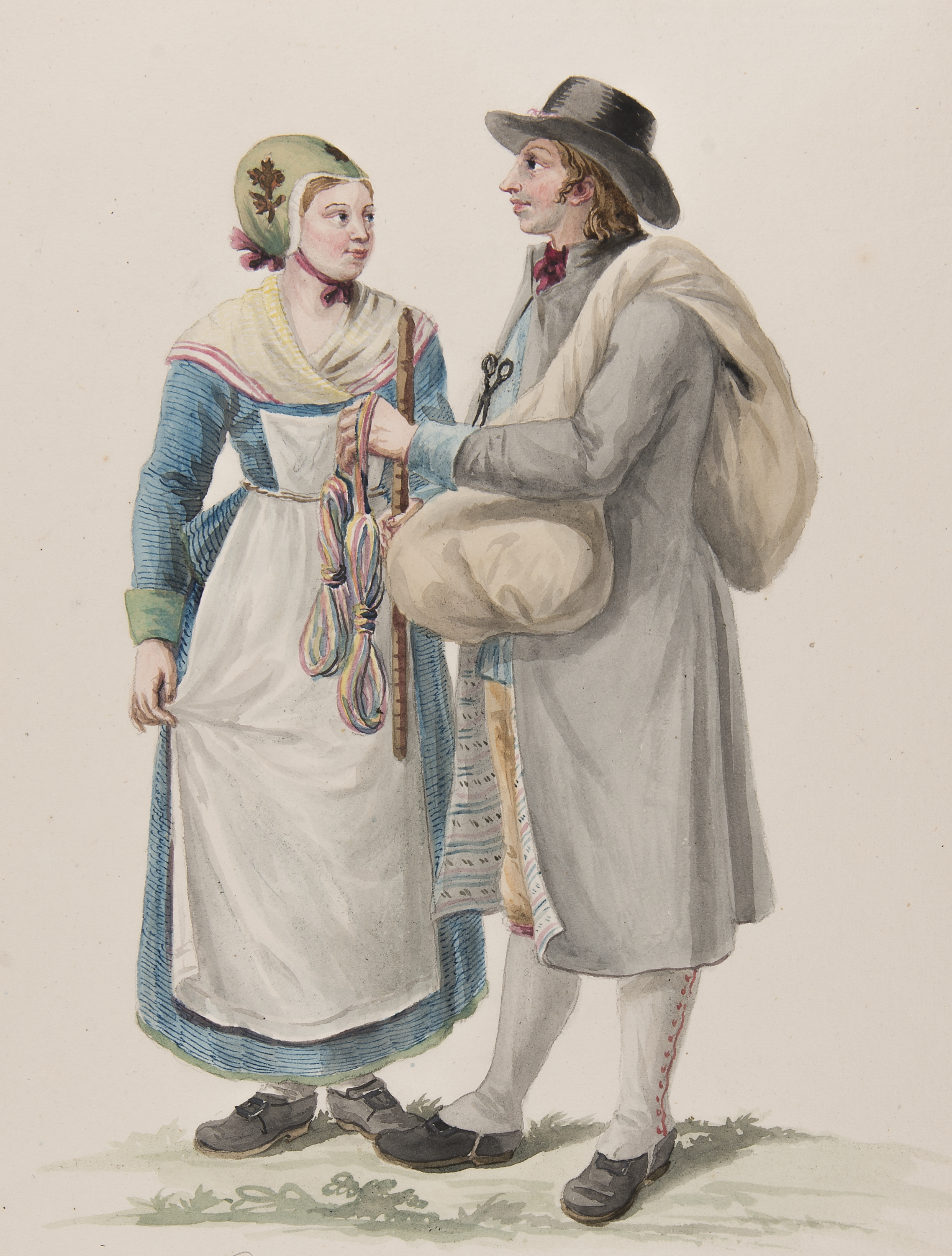 Dräkt. "Habitants de la Westergothie" En knalle och en kvinna. Akvarell i storformat av C.W Swedman Depicted place: Västergötland (Q213551)